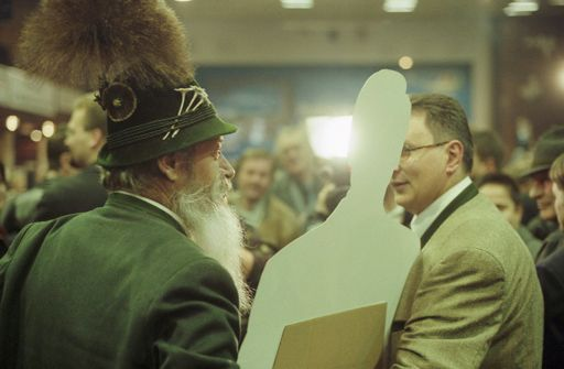 Politischer Aschermittwoch